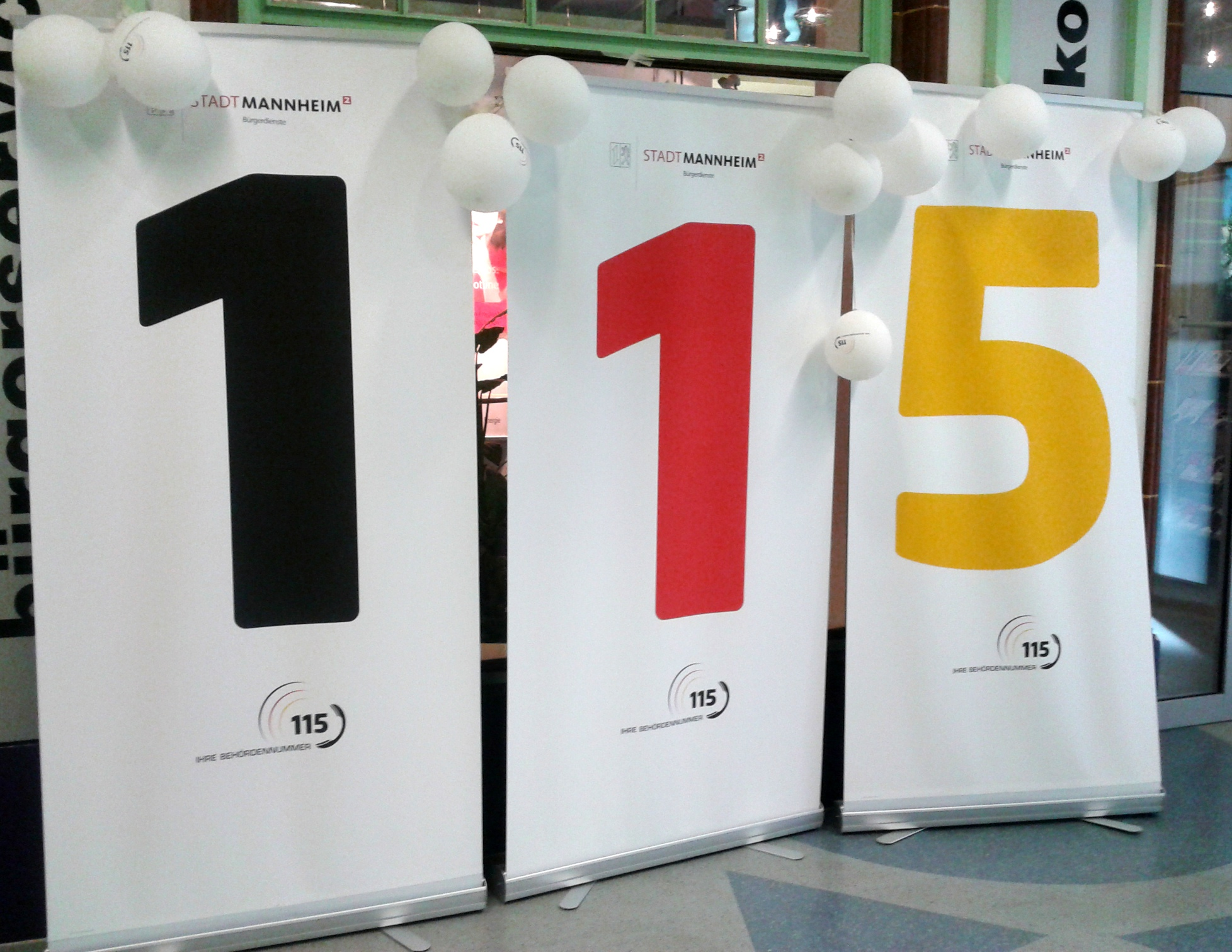 Werbung für die Behördenrufnummer 115 im Bürgerdienst K7 von der Stadt Mannheim